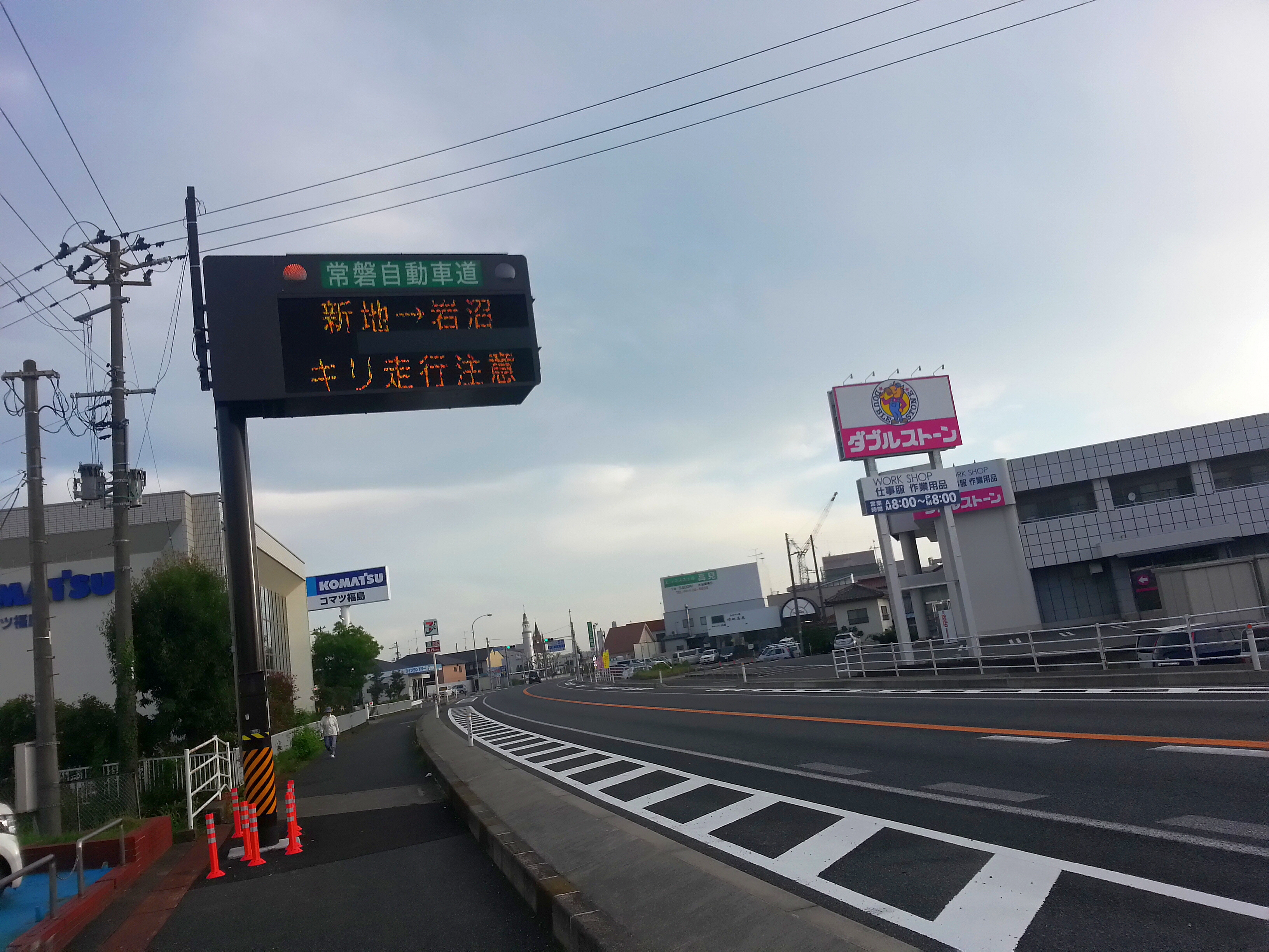 キリ means 霧